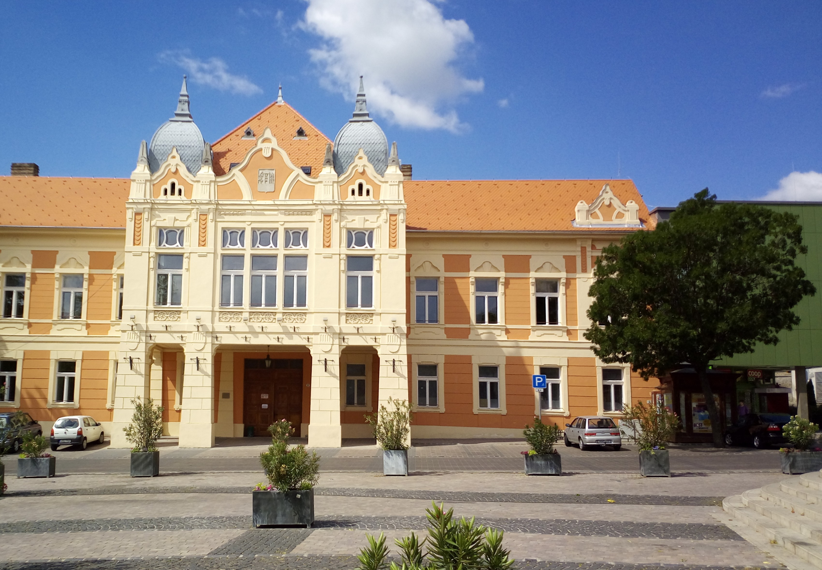 A fölújított városháza